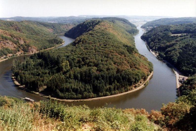 Saar loop at Mettlach Stefan Kühn, photographed: 26. August 2003 Bild:Saarschleife.jpg Слика:Saarloop.jpg